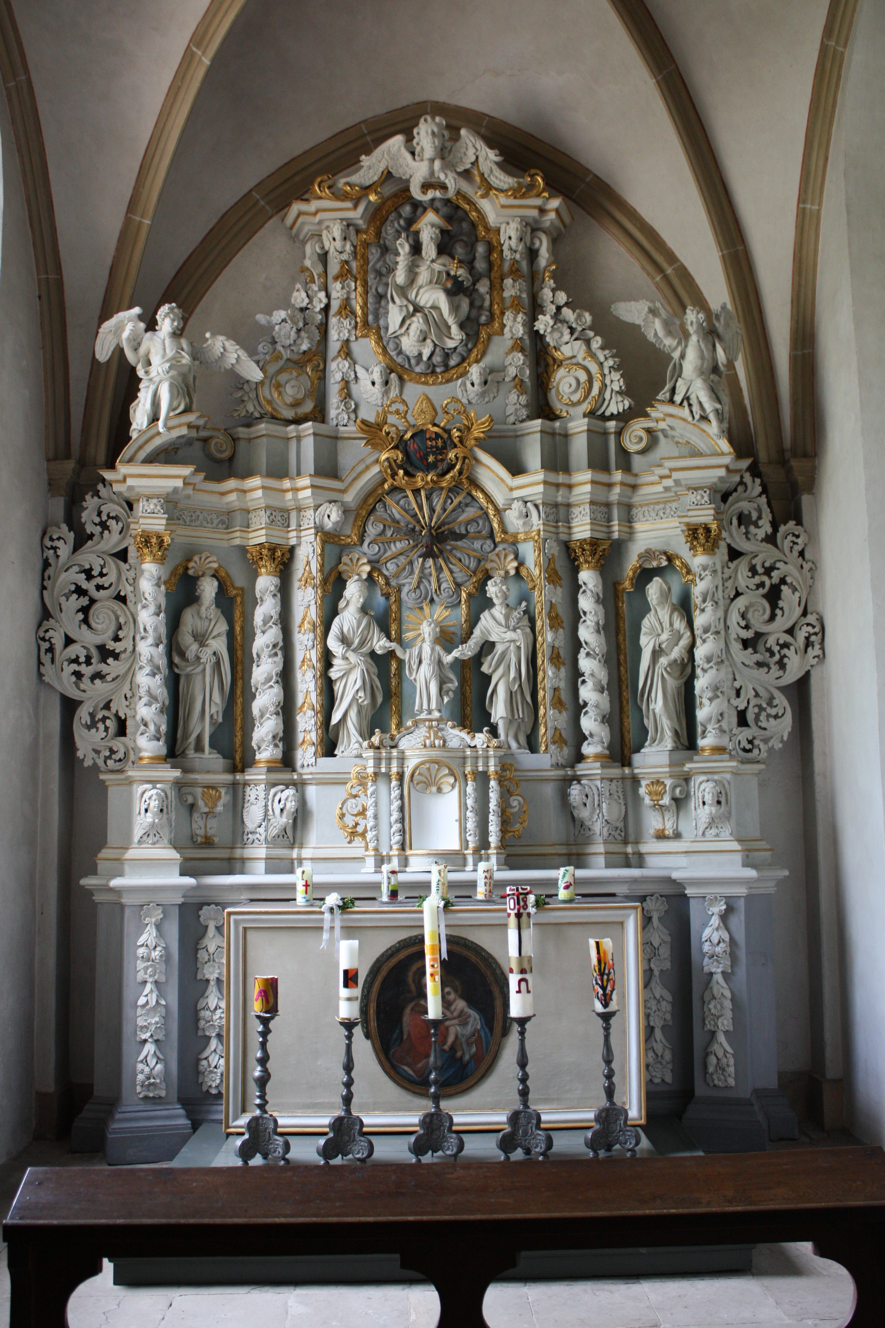 Altar der Heiligen Familie im ehem. Kloster Marienfeld